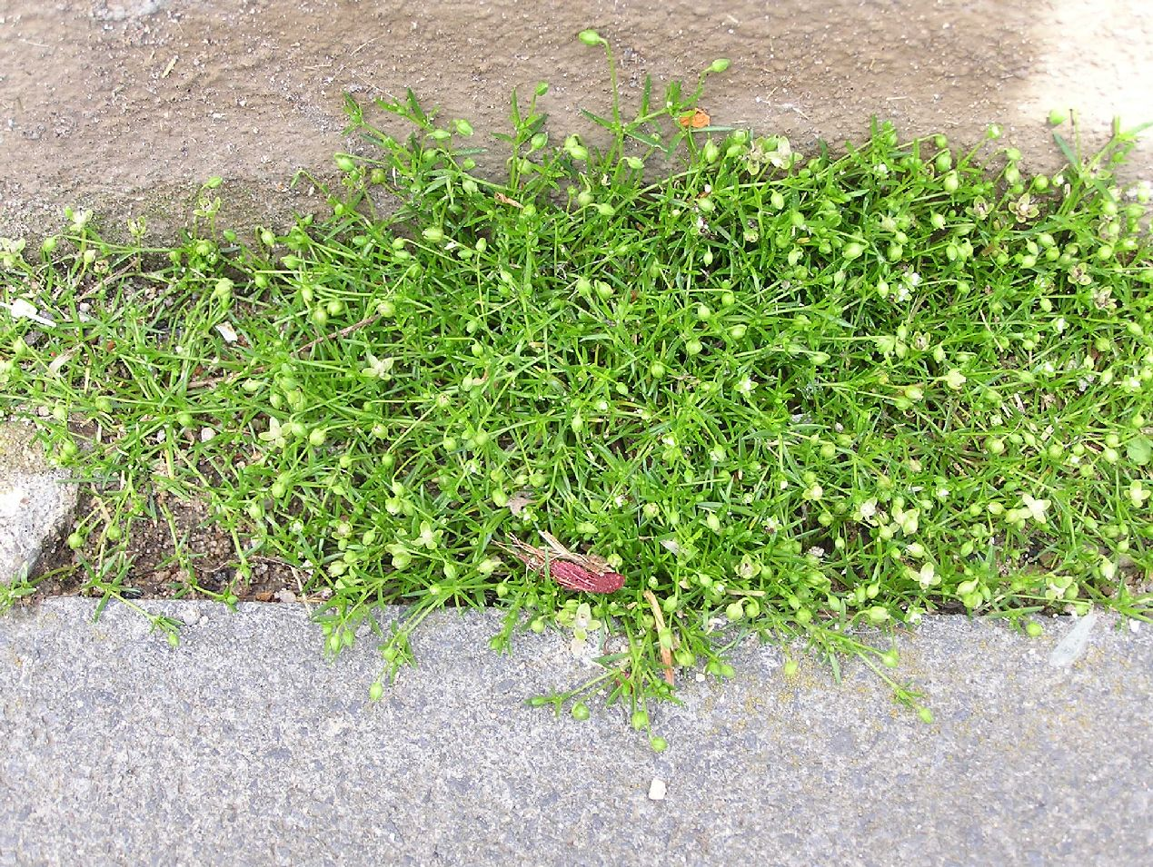 Sagina procumbens in einer Pflasterritze in Bonn.